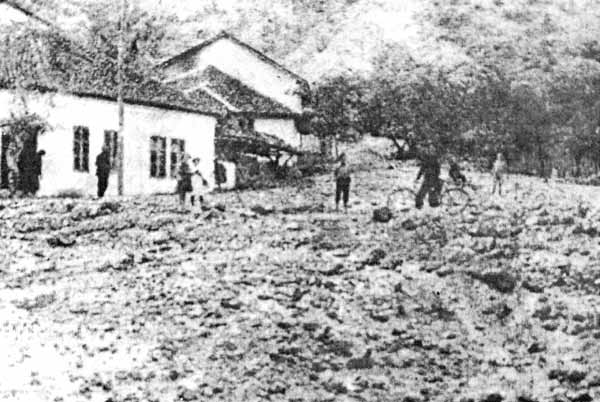 с. Рани луг през 1937 г.